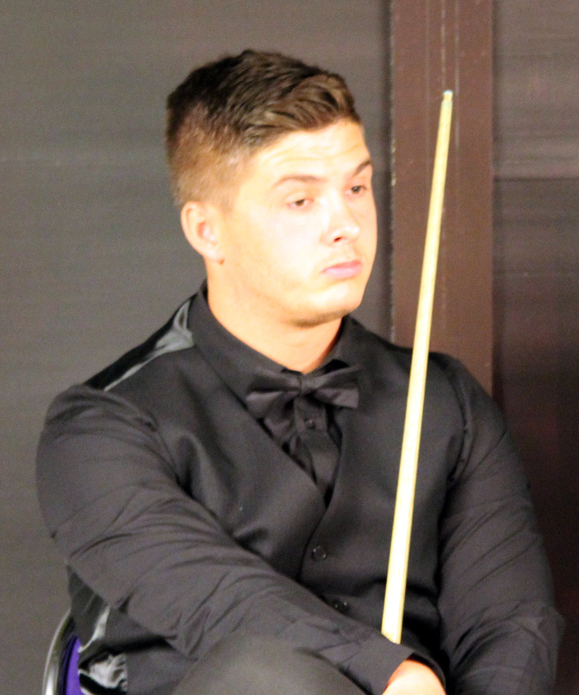 Alex Davies beim Paul Hunter Classic 2012